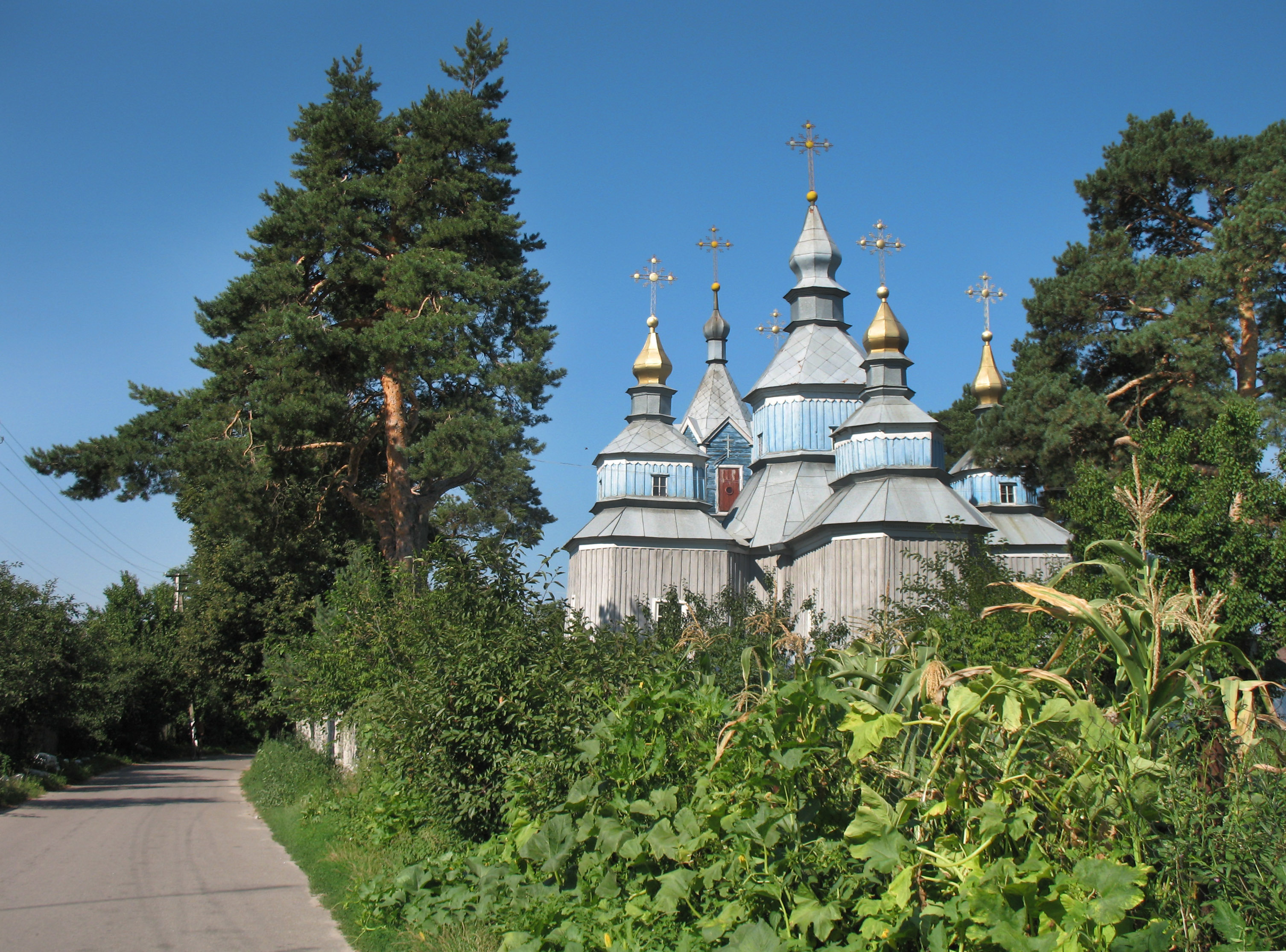 Миколаївська церква у с. Синява Рокитнянського району Київської області. Україна 1730р. Дерев'яна